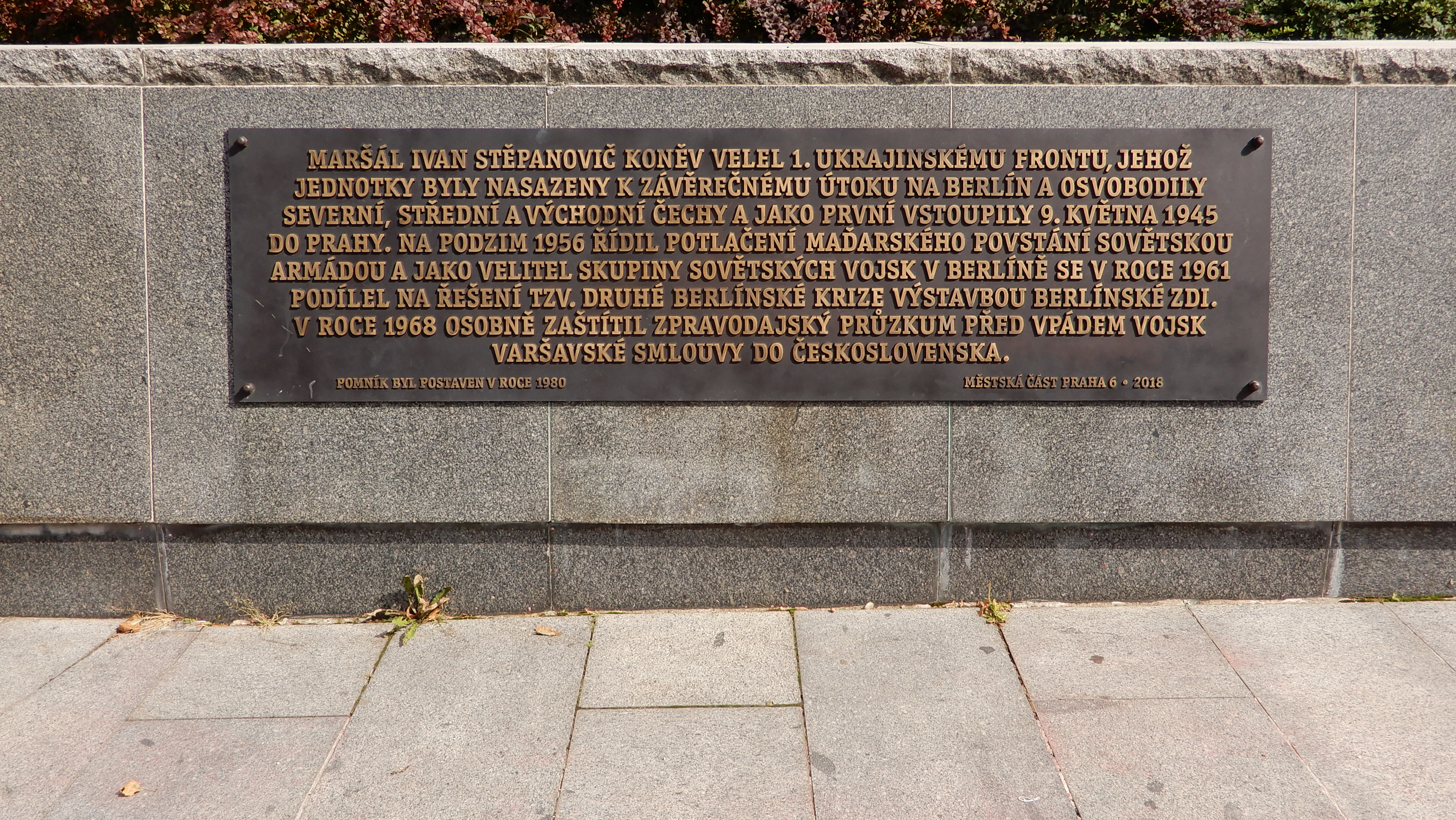 Nápisová tabulka na pomníku sovětského maršála Ivana Stěpanoviče Koněva v Praze 6 - Bubenči, náměstí Interbrigády, bronz 2018